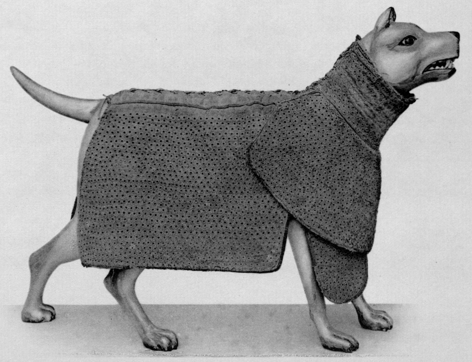 Originaltitel: Nr. 319. Jagdhund-Panzer, 17. Jahrh. siehe auch Beschreibung in: Die Waffen der Wartburg. S. 90 Dank an Benutzer:Doc Taxon und Wikipedia:Bibliotheksrecherche für den Scan.